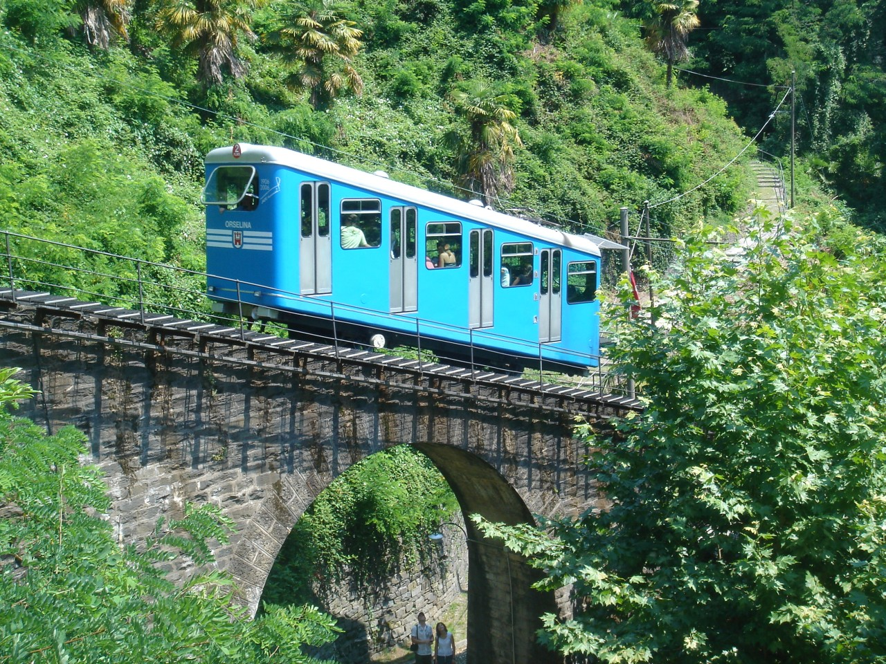 Standseilbahn Locarno–Madonna del Sasso unterhalb der Bergstation in Orselina